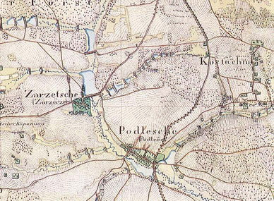 Fragment mapy z 1827. Autor nieznany. Źródło: Biblioteka Miejska w Kostuchnie